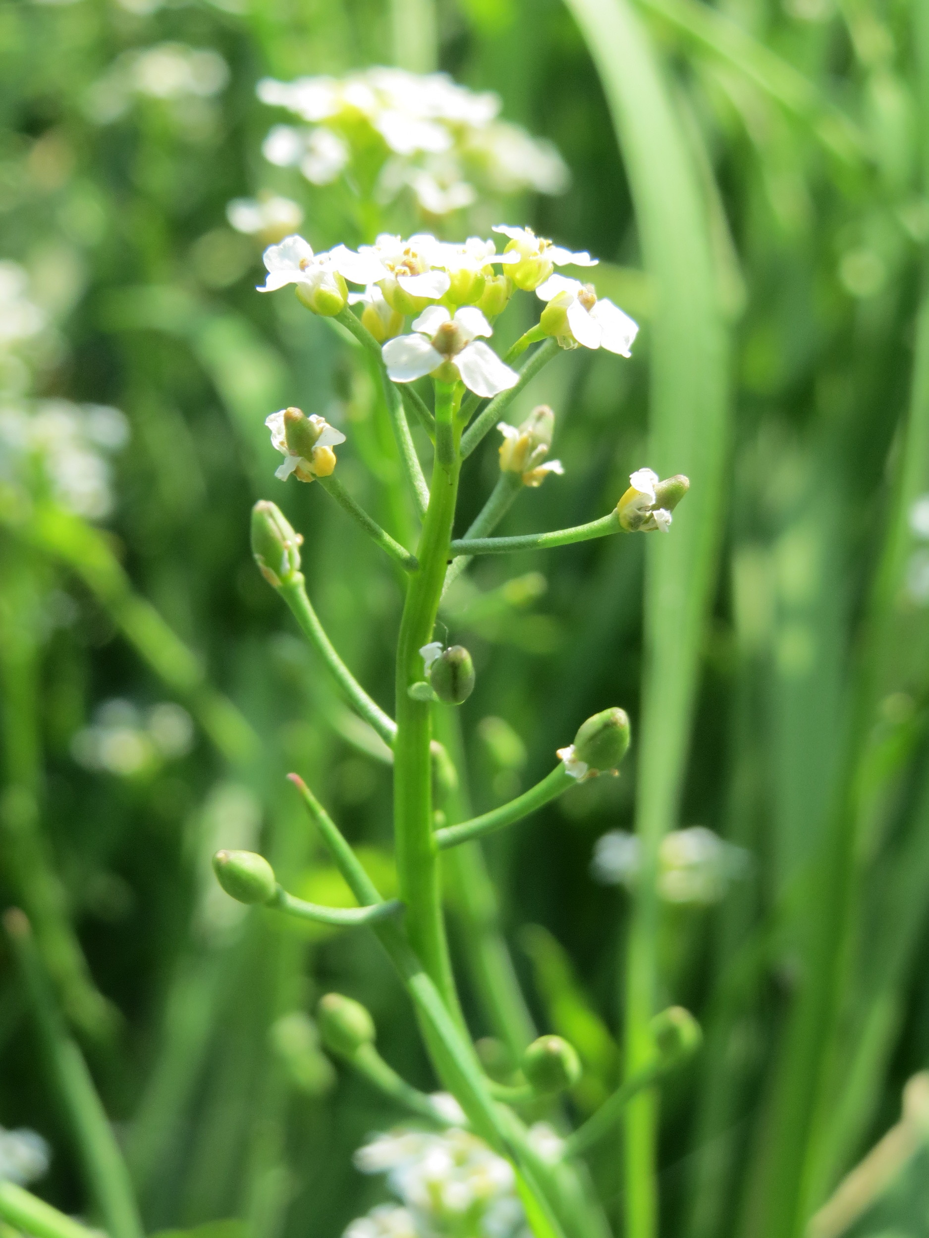 der seltene Wendich (Calepina irregularis) im Gartenschaupark Hockenheim